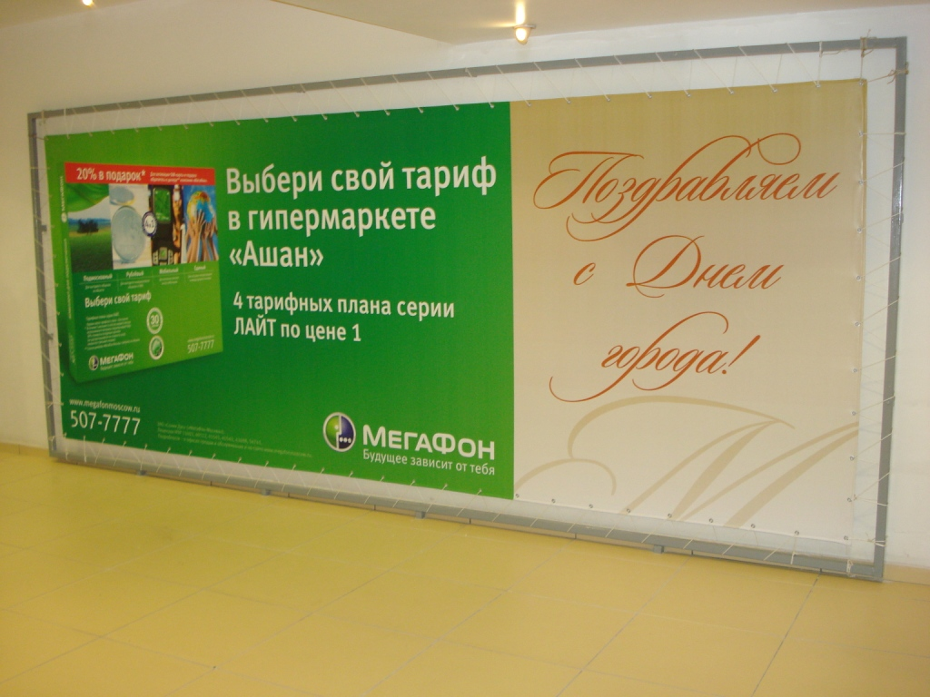 Баннер для праздничного оформления города Москвы